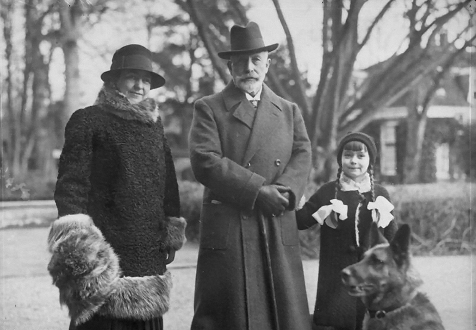 Eine interessante Aufnahme des Exkaisers Wilhelm II in Doorn! Exkaiser Wilhelm II. in Doorn mit seiner Gattin Hermine und deren Töchterchen Henriette bei einem Spaziergang im Park in Doorn. Information added by Wikimedia users.Aufnahme: Atelier Balassa - Erschienen in: 'Tempo' 13.12.1932[1]